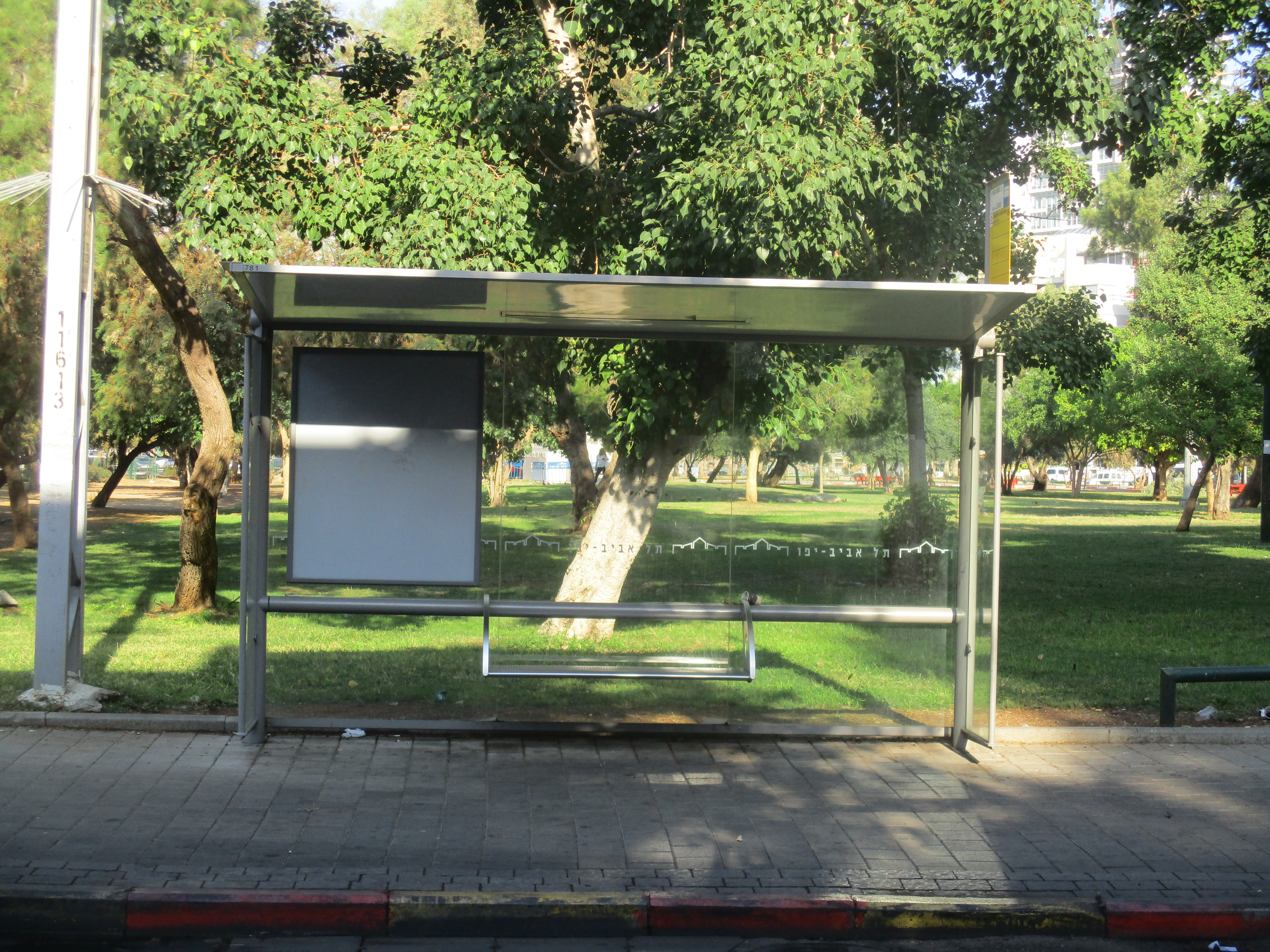 תחנת אוטובוס קוי דן בתל אביב תחנת שוק הכרמל, גן הכובשים